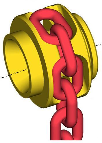 Corona de barbotén.